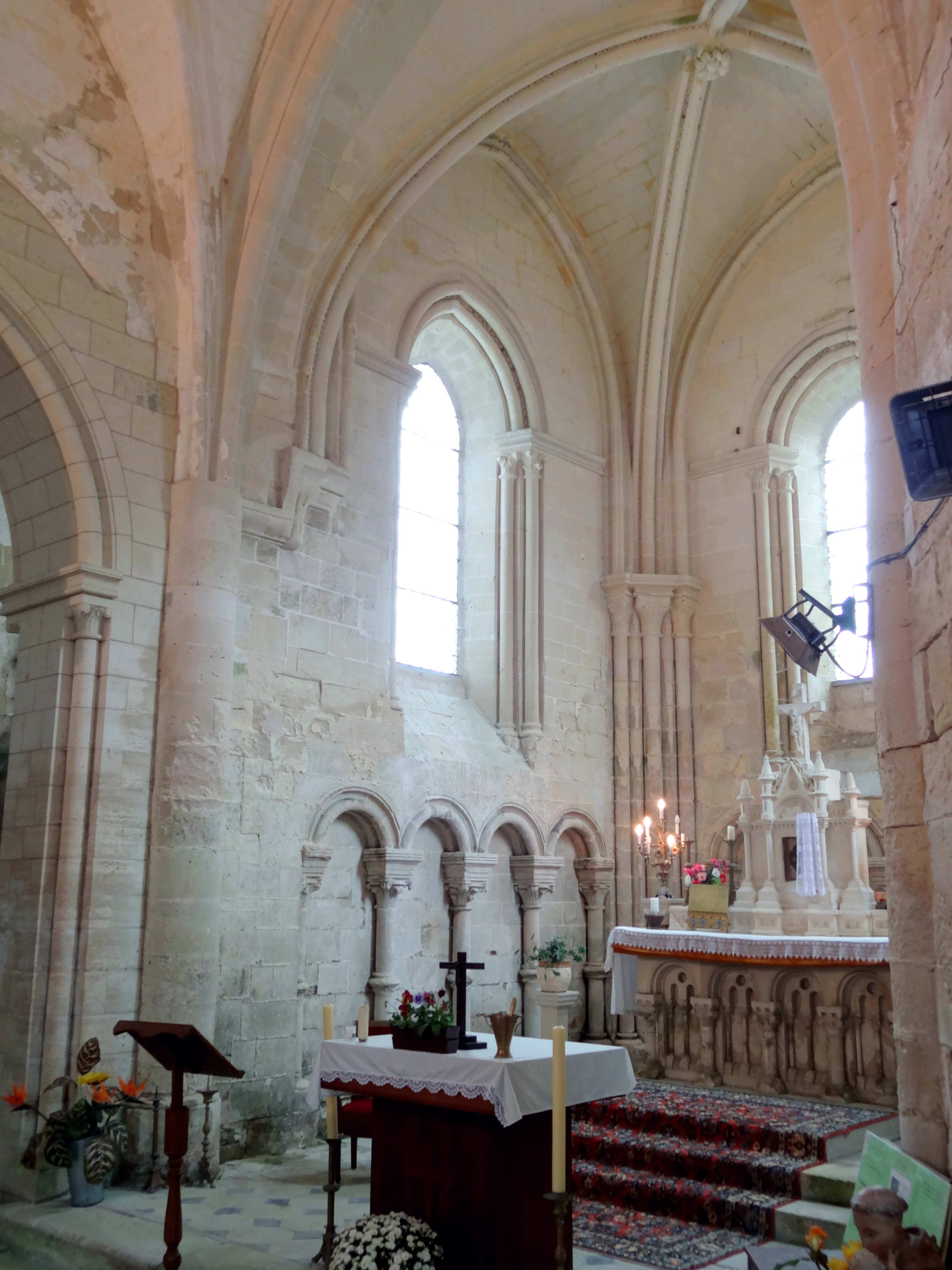 Intérieur de l'église - voir titre.